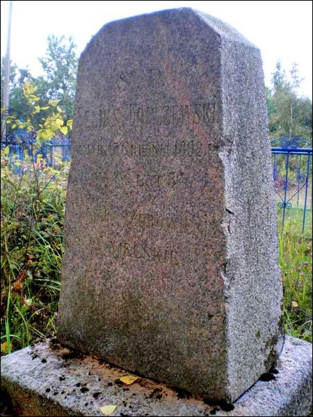 Надмагільны помнік Феліксу Тапчэўскаму на Рукшэніцкіх могілках